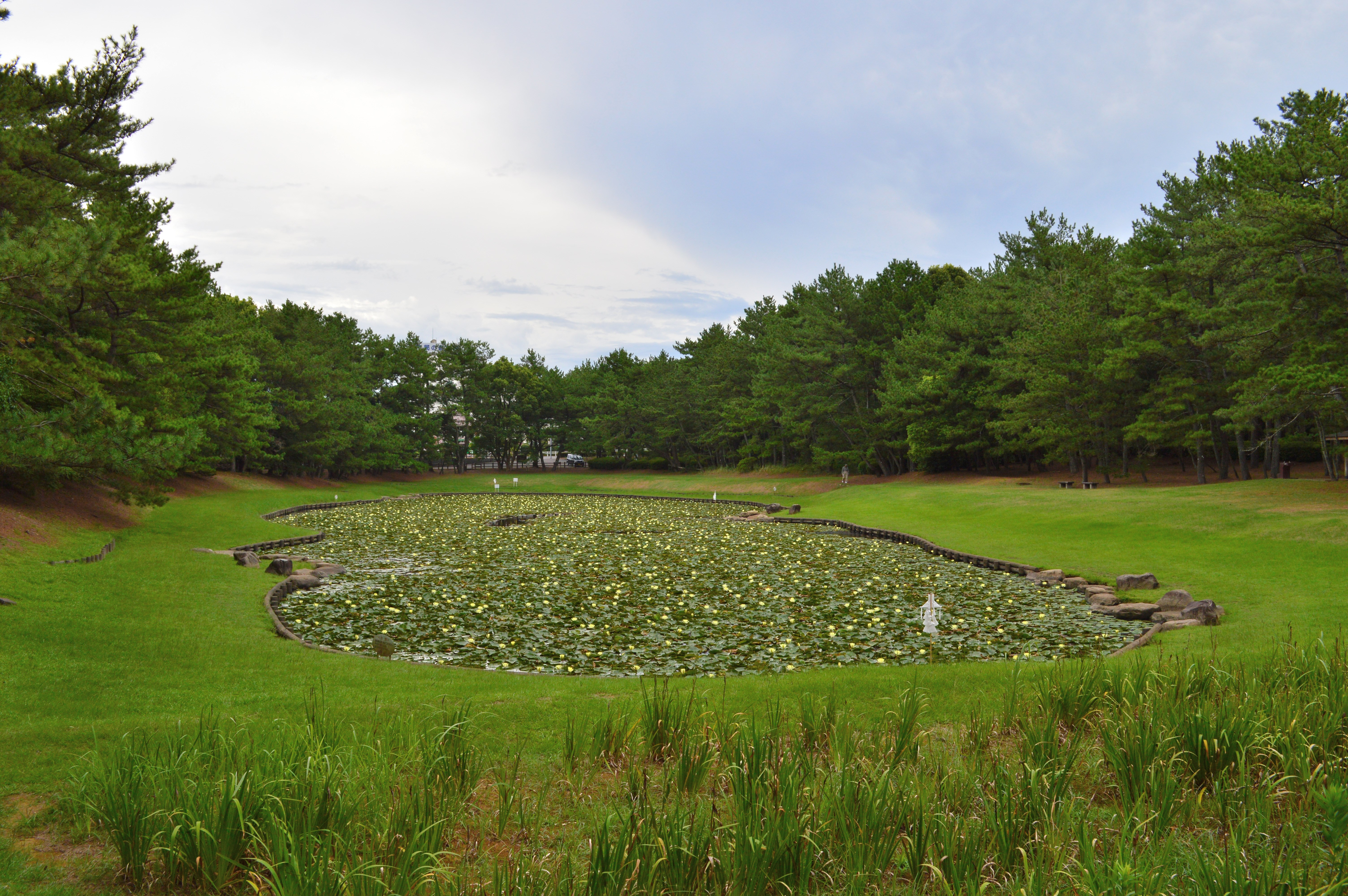 江田神社 (宮崎市) 御池 (南より)